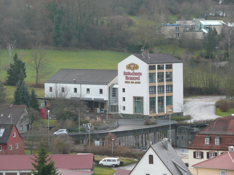 Betriebsgebäude der Rotochsenbrauerei Ellwangen, vom Schloßberg aus aufgenommen